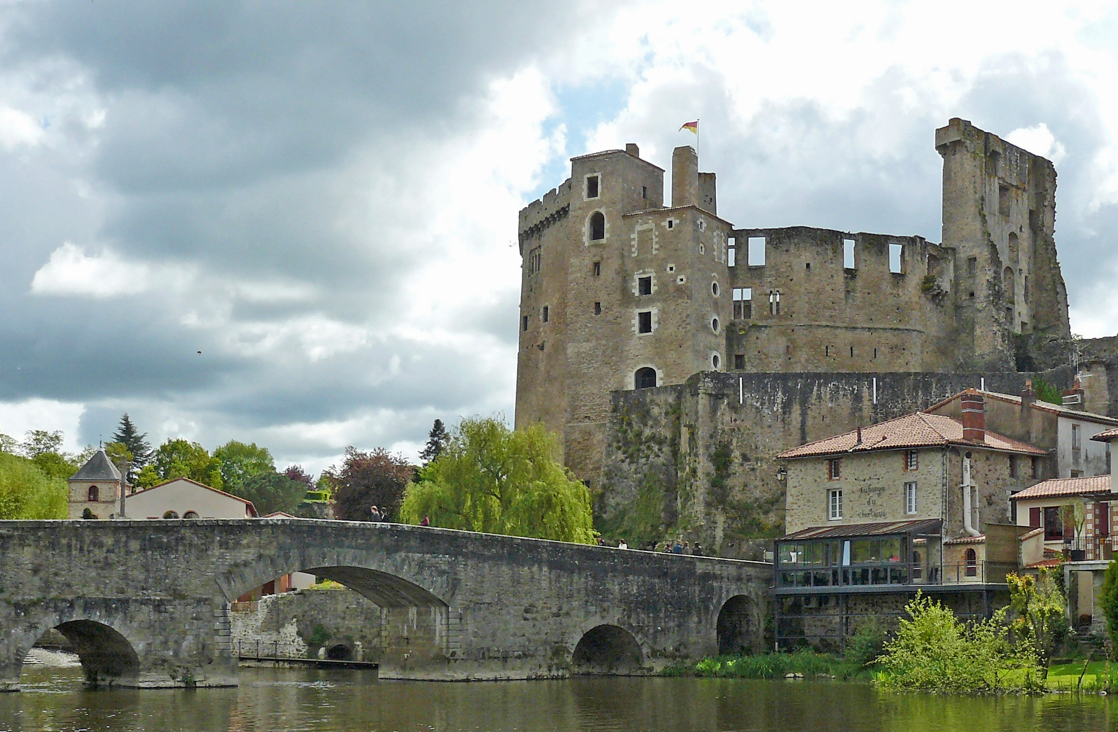 Vue du château de Clisson et le pont sur la Sèvre